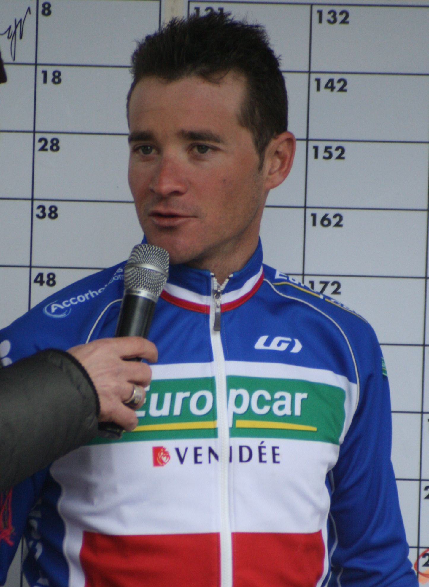 Kuurne-Bruxelles-Kuurne 2011, Thomas Voeckler